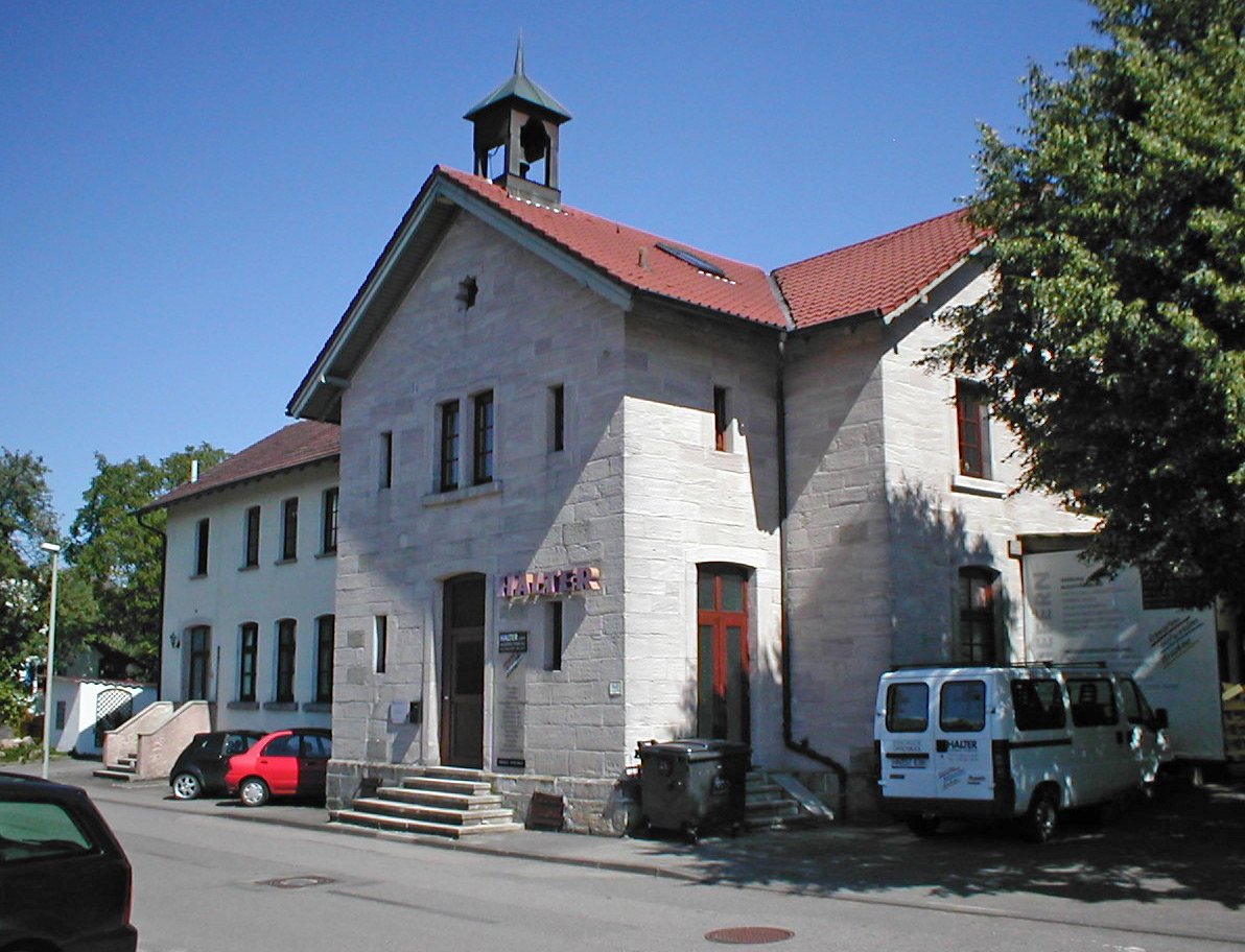 Altes Schulhaus in Billensbach (Beilstein, Württ.), heute Gewerbebetrieb